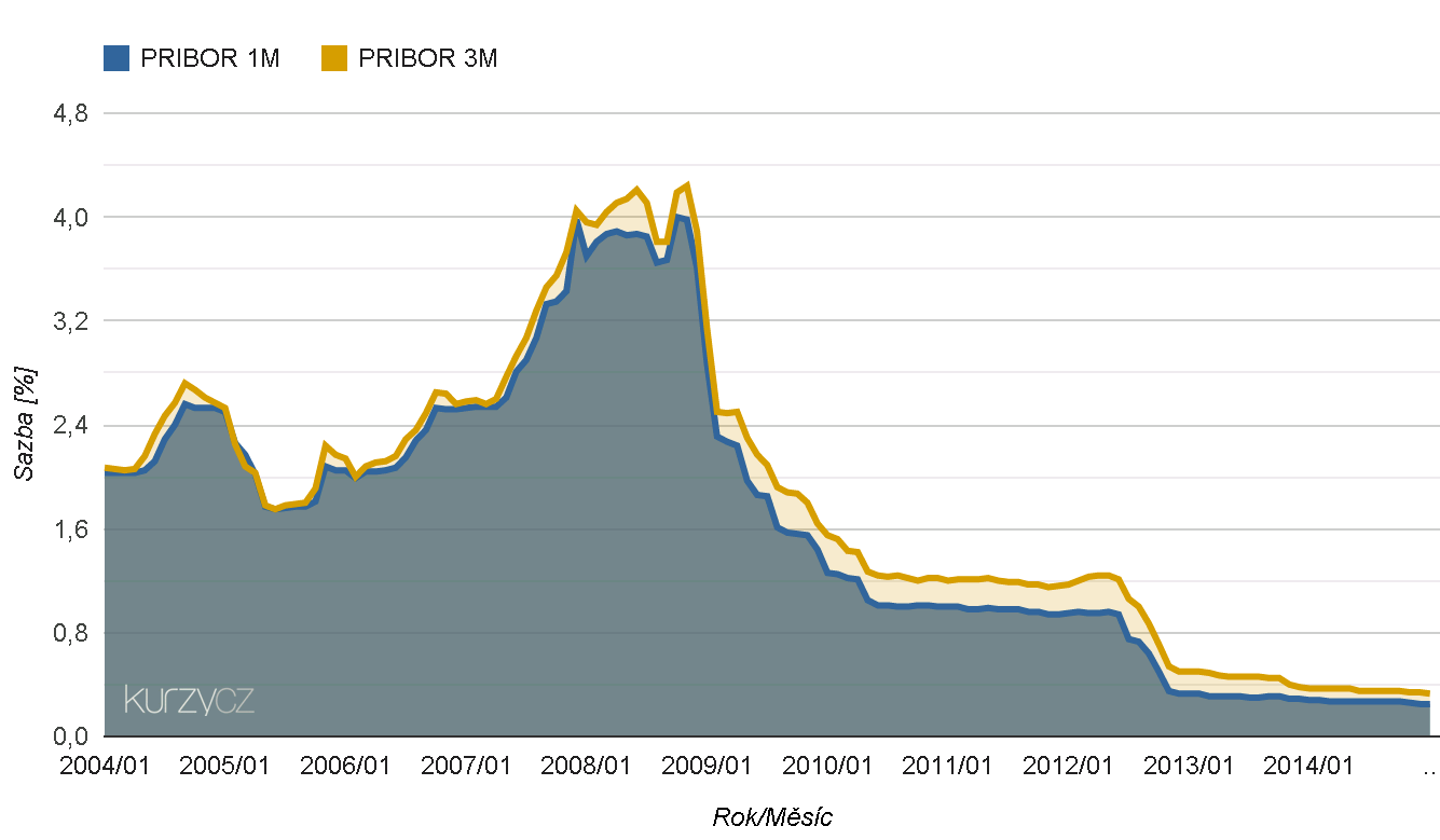 Graf vývoje mezibankovních sazeb PRIBOR